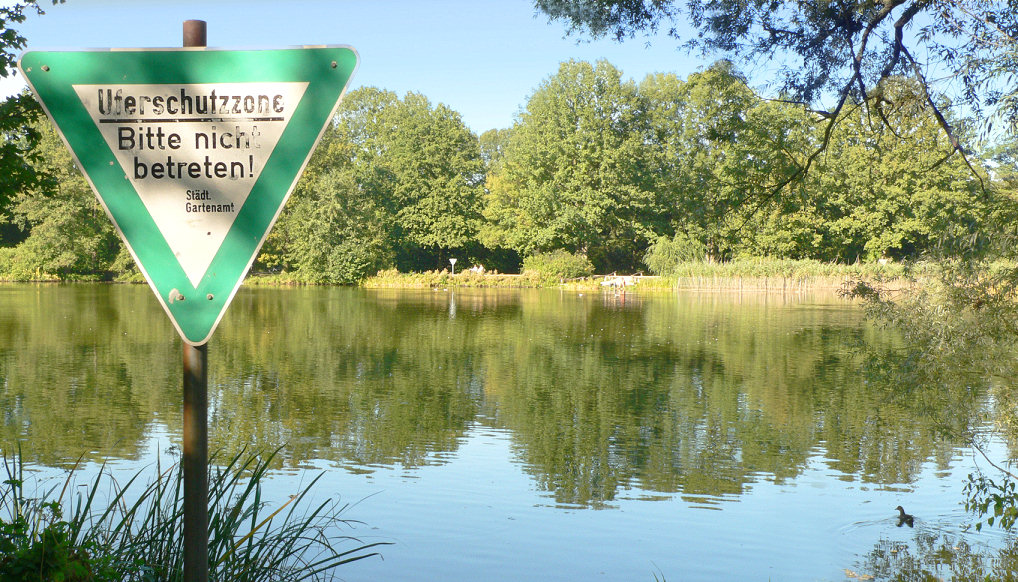 Annateich im Hermann-Löns-Park in Hannover